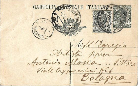 Cartolina postale spedita da Porto San Giorgio il 8 aprile 1923 da Sigismondo Nardi al pittore Antonio Mosca via dei Cappuccini, 6 Bologna per prendere accordi per i lavori di restauro e decorazione della parrocchia di Borgo Valsugana